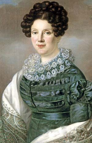 Авдотья Ильинична Истомина (1799-1848)